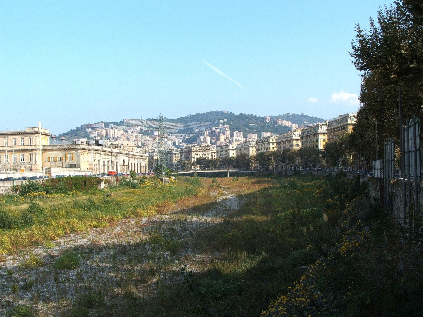 Genova - Il letto - praticamente in secca - del torrente Bisagno all'altezza del Borgo Incrociati. Sullo sfondo si nota, sulle alture, il complesso detto del Biscione. Foto di Rinina25 & Twice25 - ottobre 2005